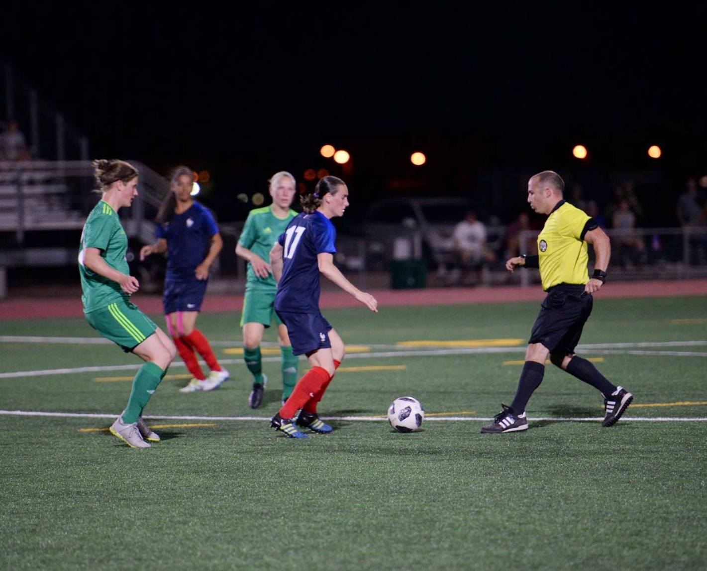 He United States Armed Forces Delegation hosts the 11th Conseil International du Sport Militaire (CISM) World Military Women's Football (Soccer) Championship Fort Bliss, Texas, June 22 through July 5, 2018. This event will feature teams from United States, Bahrain, Brazil, Canada, China, France, Germany, Netherlands and South Korea.